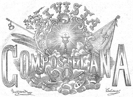 Escudo de Galiza na Revista Compostelana.